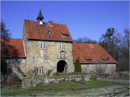 Schloß Apelern, Torbogen